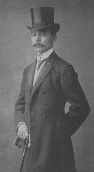 大島富士太郎子爵